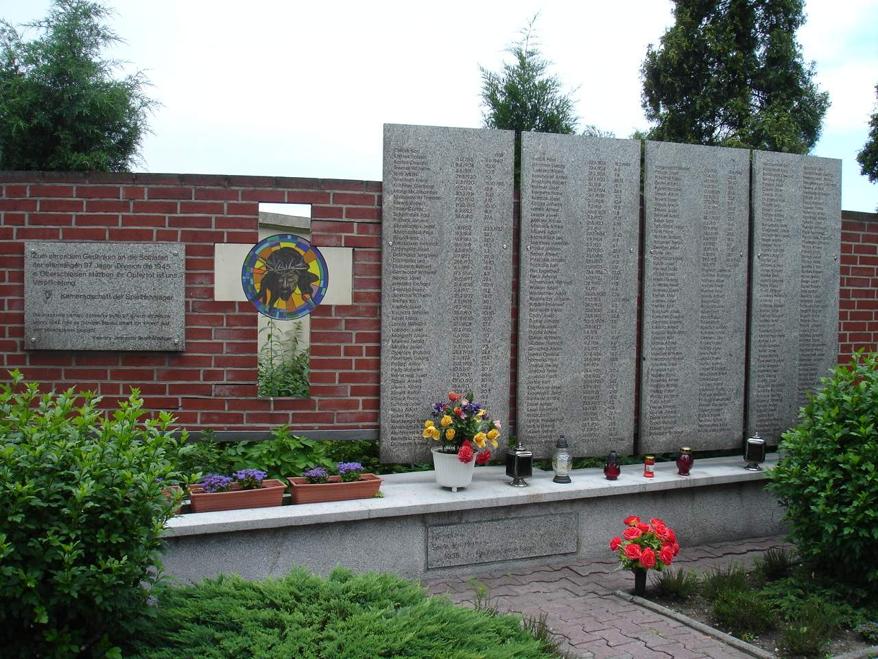 Krzanowice (pro memoria)